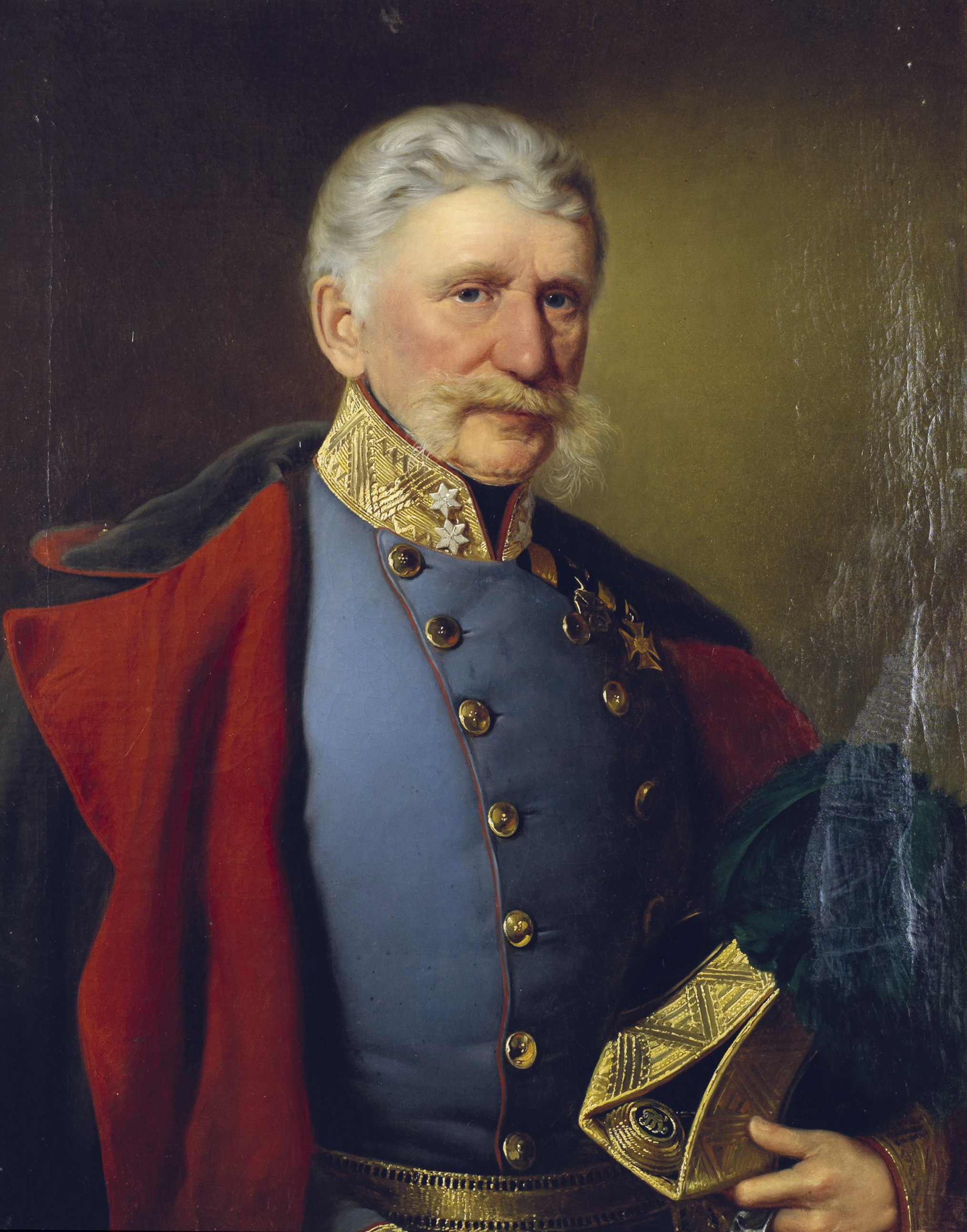 "Portrait des Feldmarschall Julius Manger, Ritter von Kirchsberg", unsigniert, Öl auf Leinwand, 82 x 63 cm